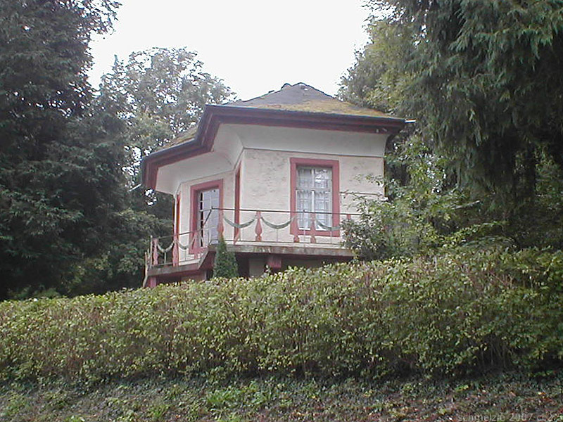 Lustschlösschen in Mauer bei heidelberg, Baden-Württemberg, Deutschland